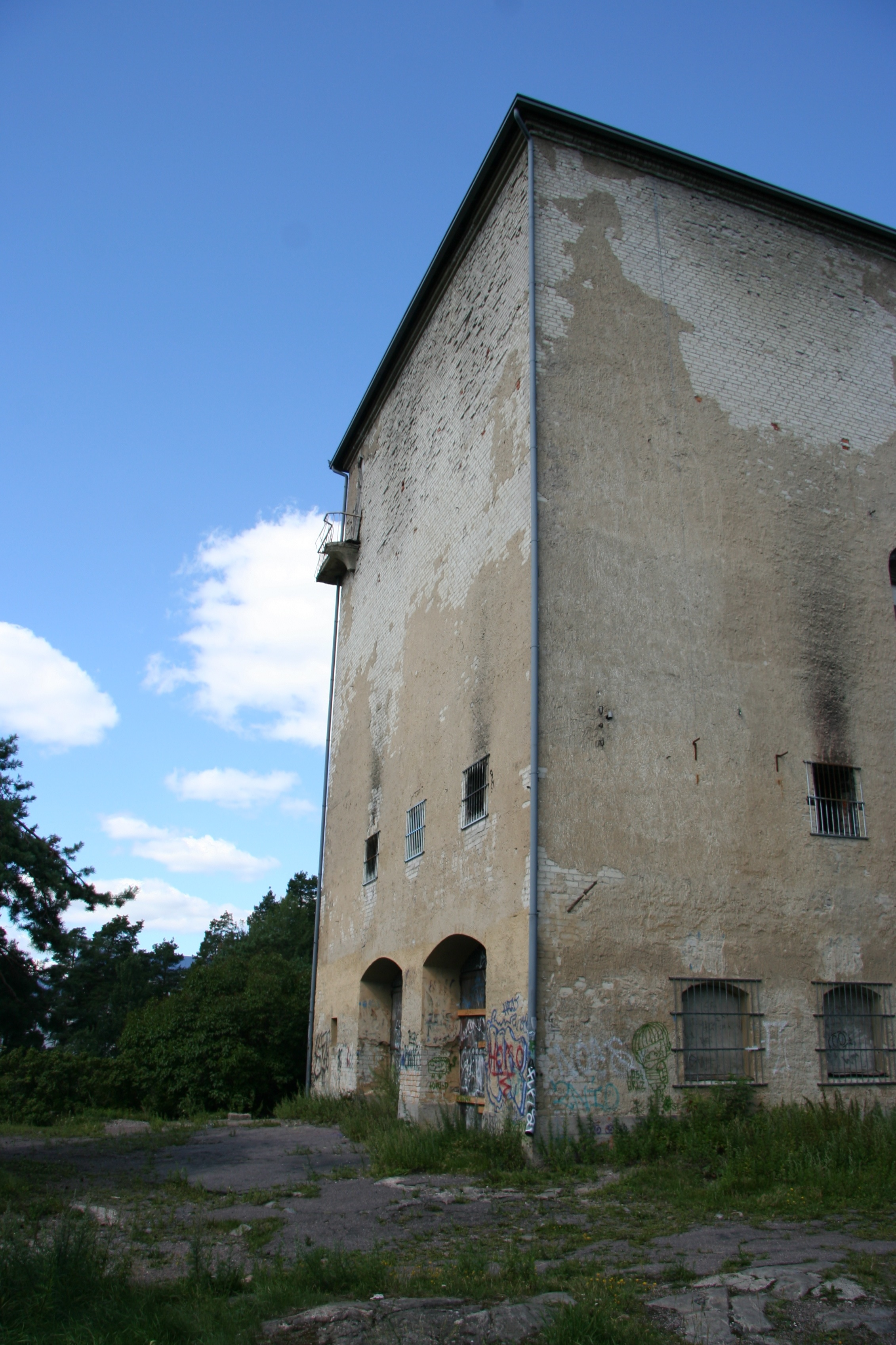 Vuoritalo Helsingin Käpylässä elokuussa 2011